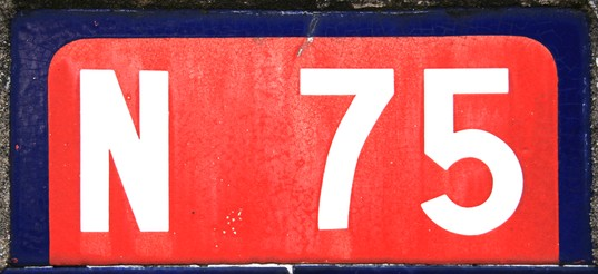 cartouche de la route nationale 75